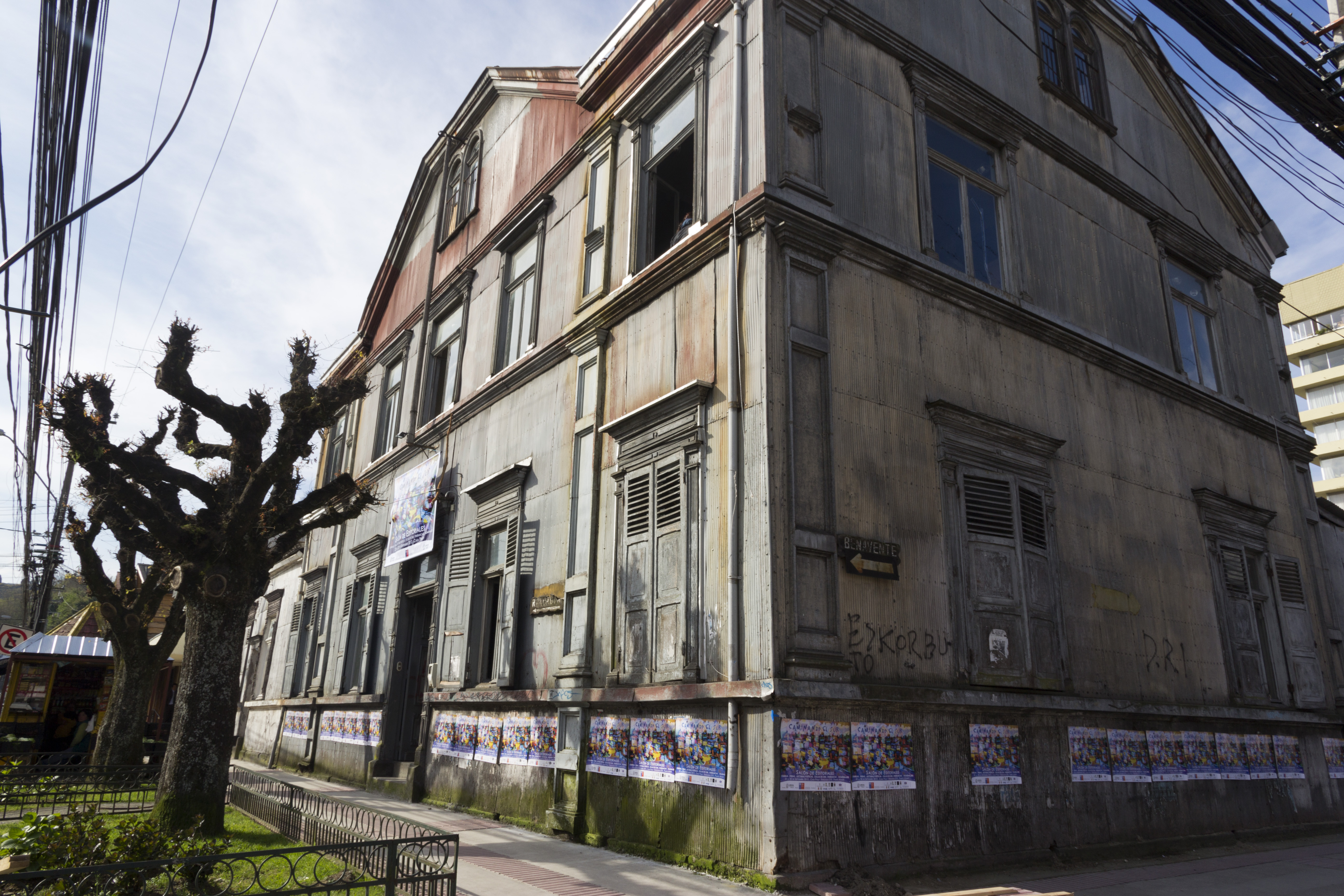 Casa Pauly This is a photo of a national monument in Chile: 2098